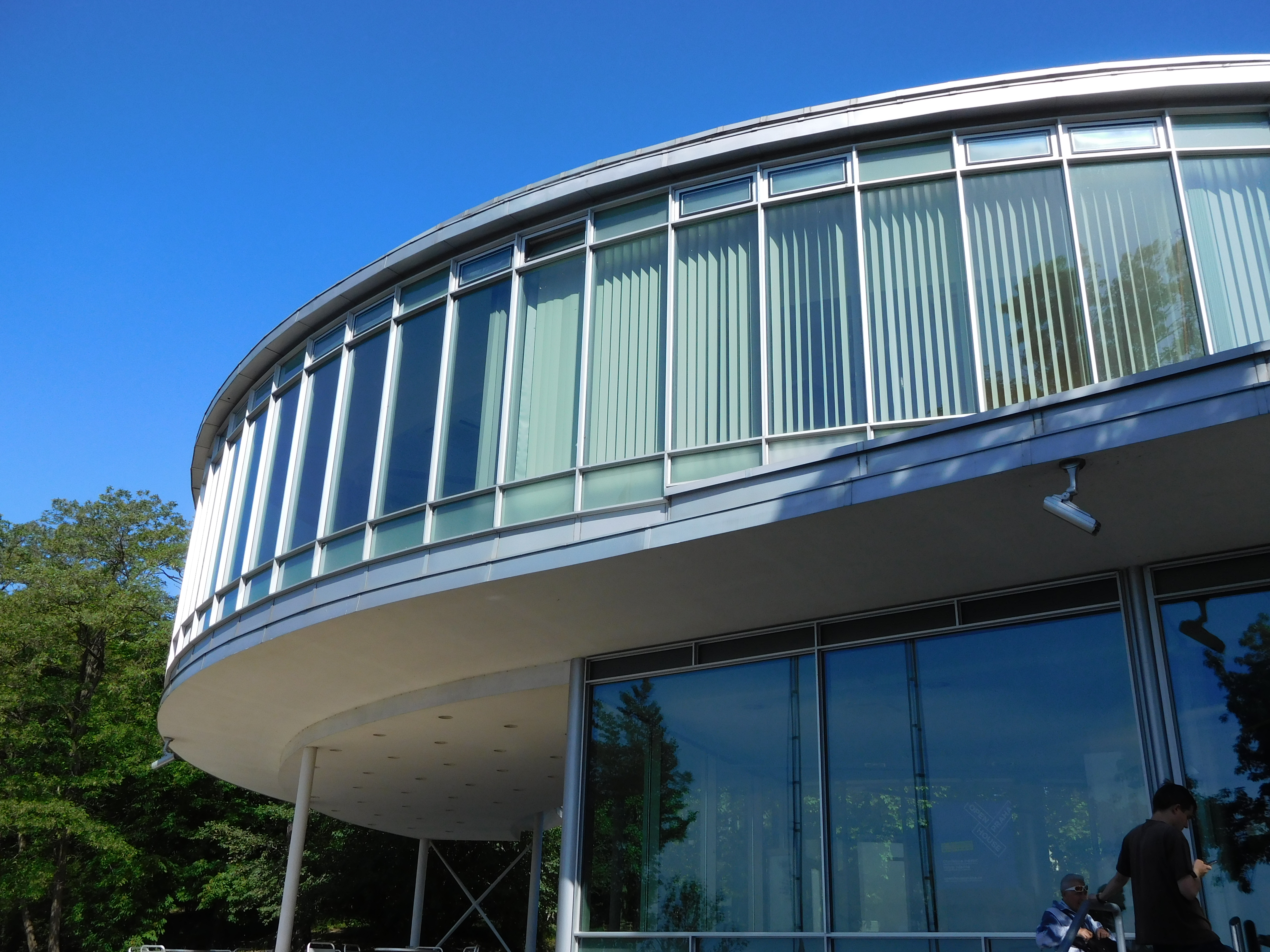 Praha - Letenské sady 80, bývalá restaurace Expo 58 - pohled od jihozápadu